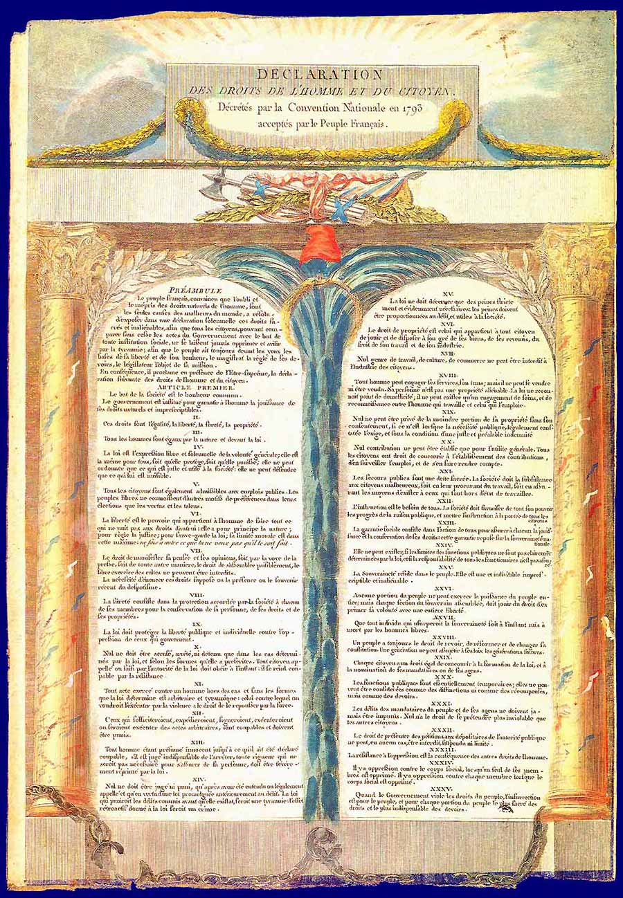 Конституція Французької Республіки 1793